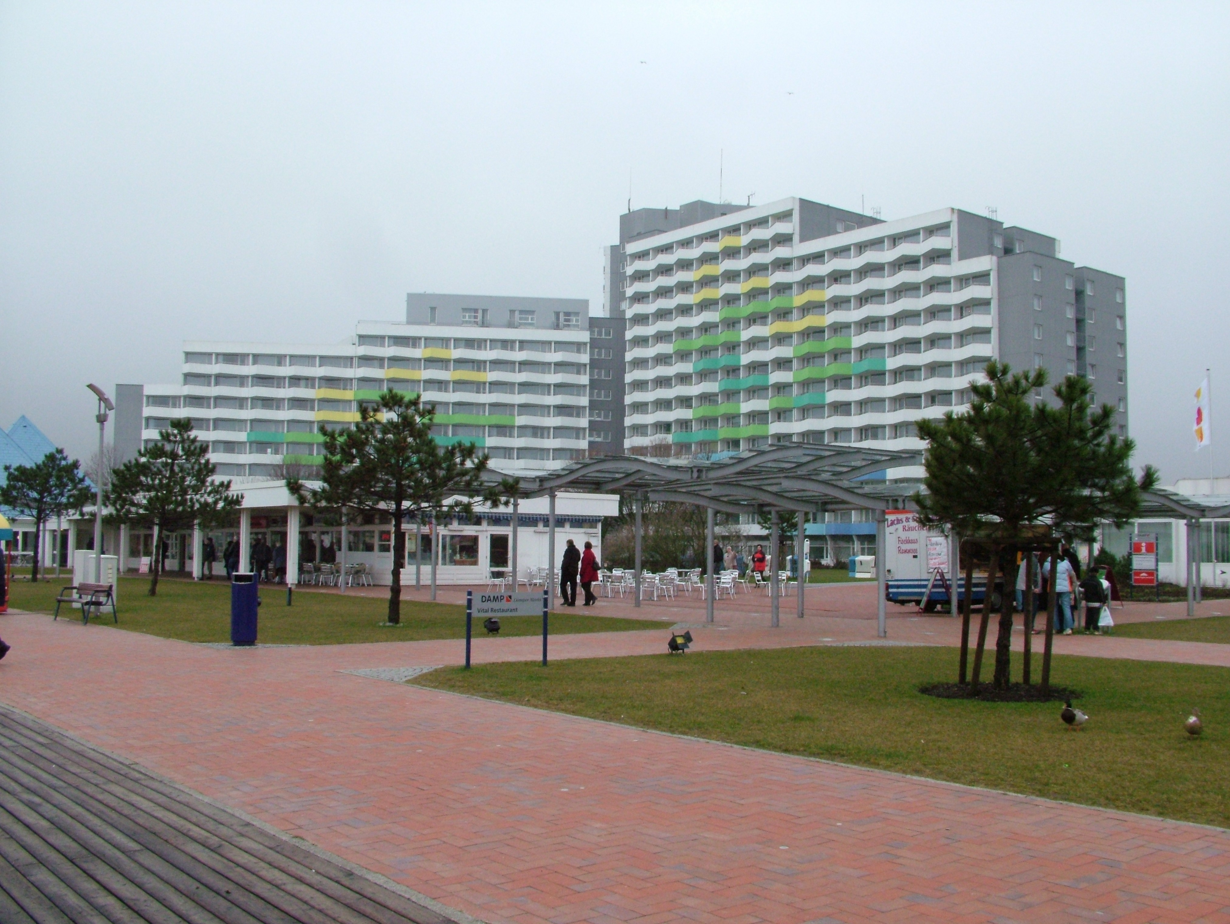 Das Ostseebad Damp in Schleswig-Holstein im März 2005. Selber fotografiert.